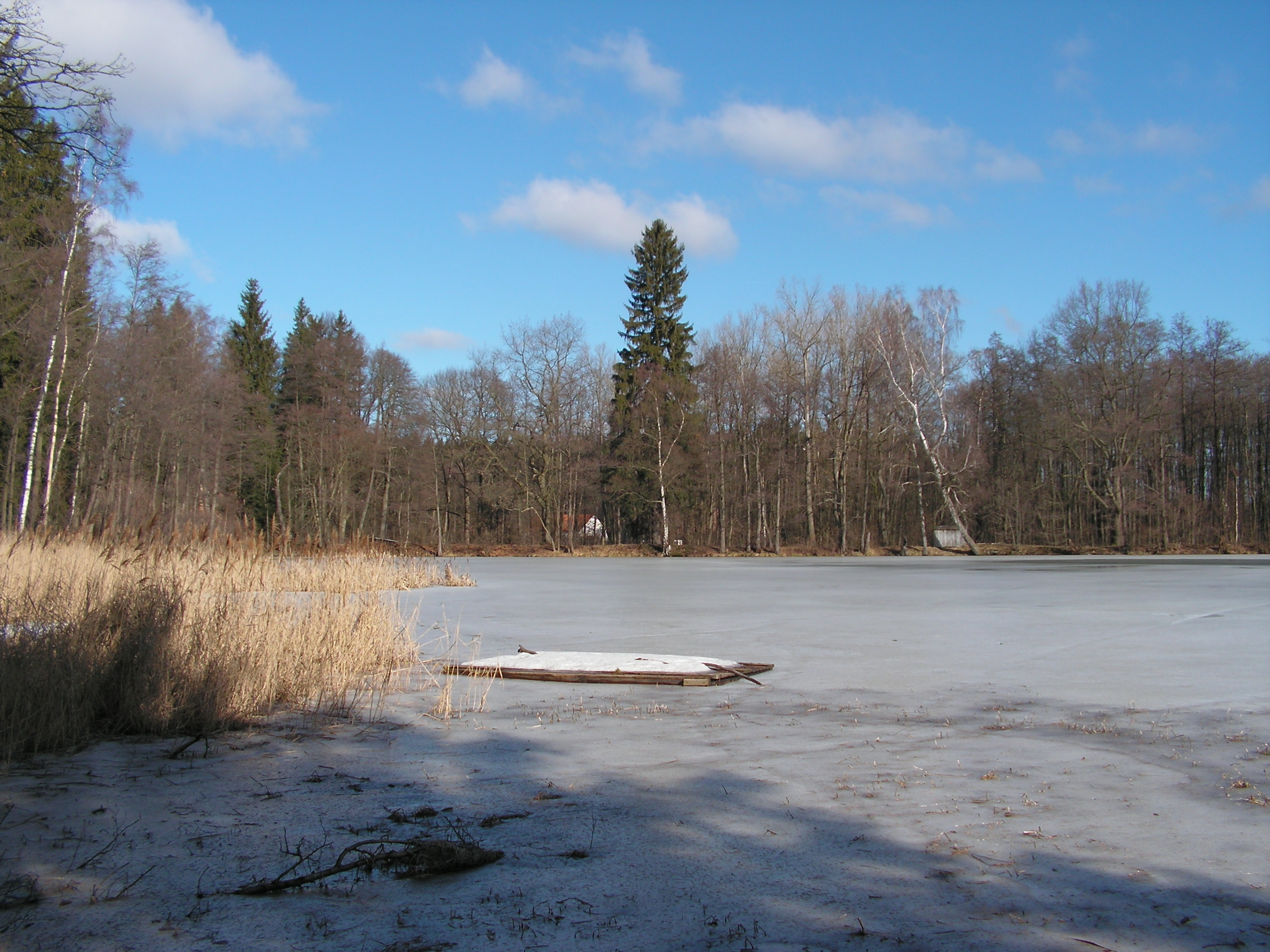 Rybník Markus na potoce Leština v okrese Havlíčkův Brod